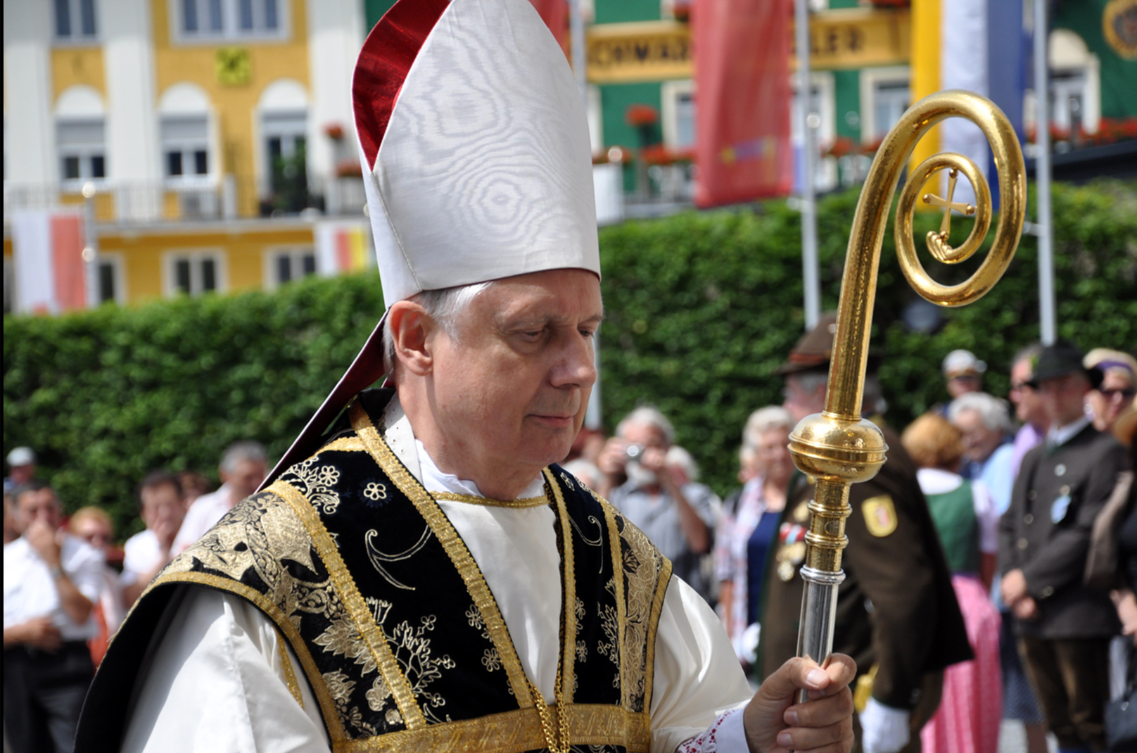 Bischof Egon Kapellari bei einem Requiem für Otto von Habsburg in Mariazell